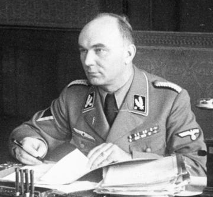 Arthur Greiser Der Chef der Zivilverwaltung beim Militärbefehlshaber in Posen, SS-Brigadeführer Präsident Greiser in seinem Arbeitszimmer in Posen. 11.10.39 "Fr. OKW" [Arthur Greiser am Schreibtisch] Abgebildete Personen: Greiser, Arthur: Senatspräsident von Danzig, Gauleiter Warthegau, Deutschland Information added by Wikimedia users.Arthur Greiser (22 January 1897 – 21 July 1946), Nazi German SS-Obergruppenführer and Reichsstatthalter in the German-occupied territory of Poland renamed Reichsgau Wartheland (sometimes called Warthegau). Greiser was one of the persons primarily responsible for organizing the Holocaust in Poland